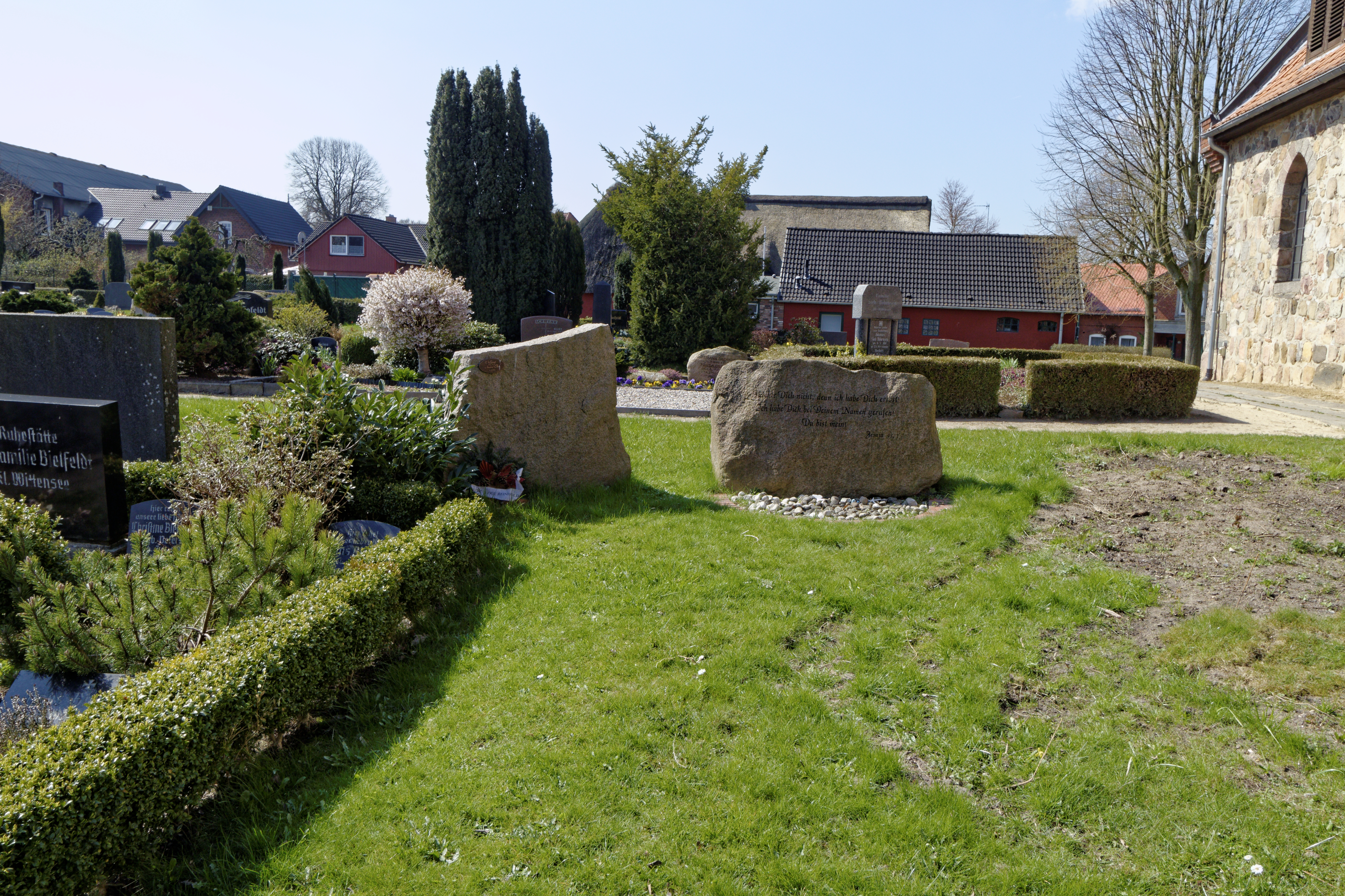 Bünsdorf, Dörperstraat; Kirchhof